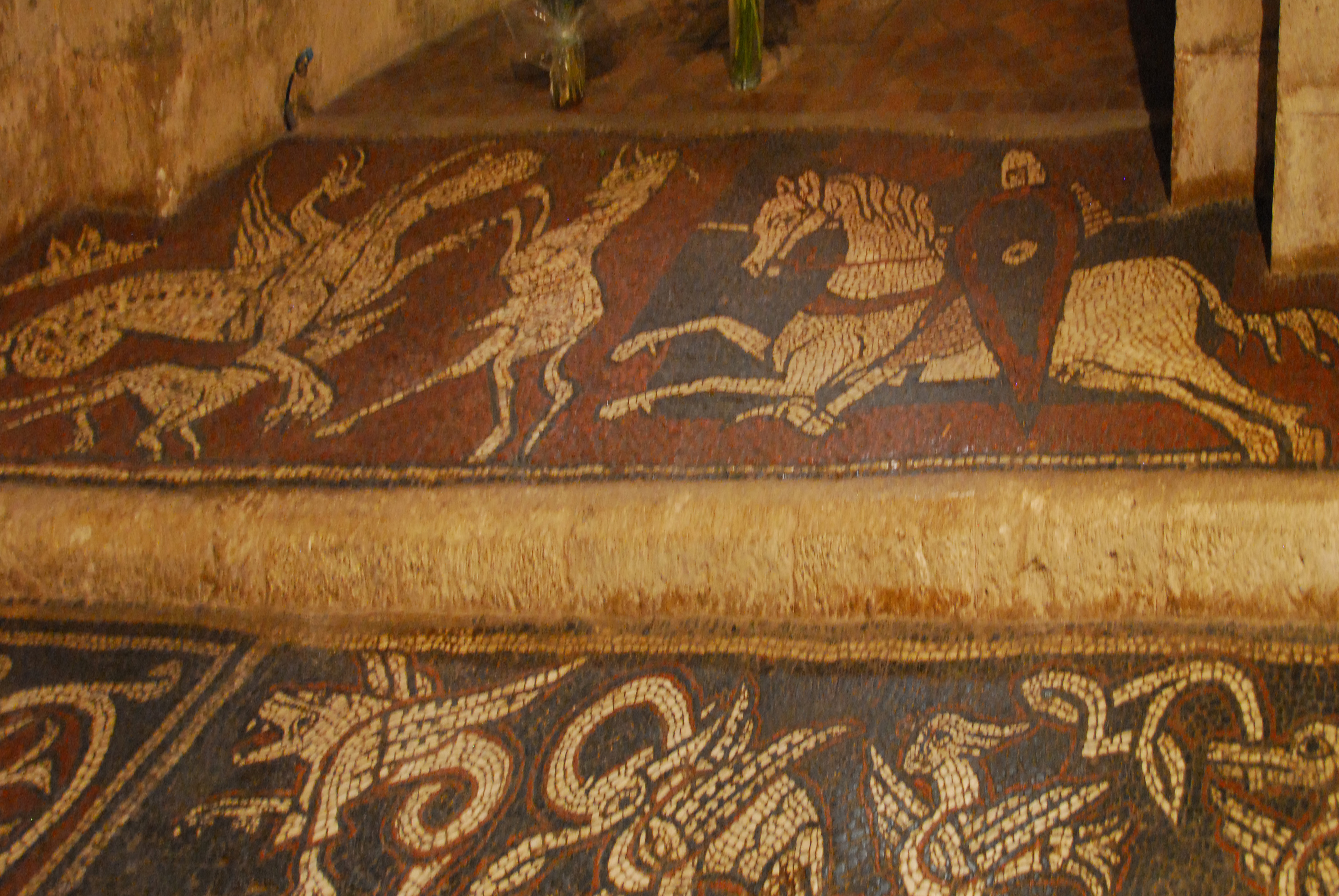 Prieuré de Ganagobie, Mosaik Nr. 1, Stufe